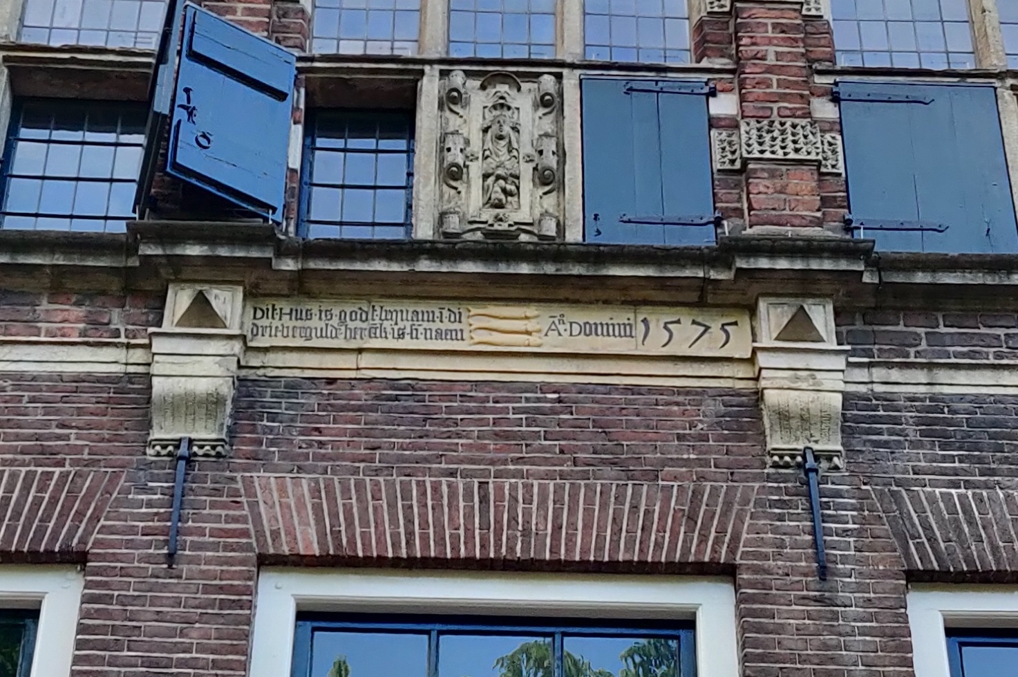 Gevelsteen van het huis De Drie Haringen te Deventer, genomen in juni 2020